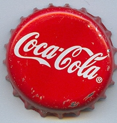 Kronkorken